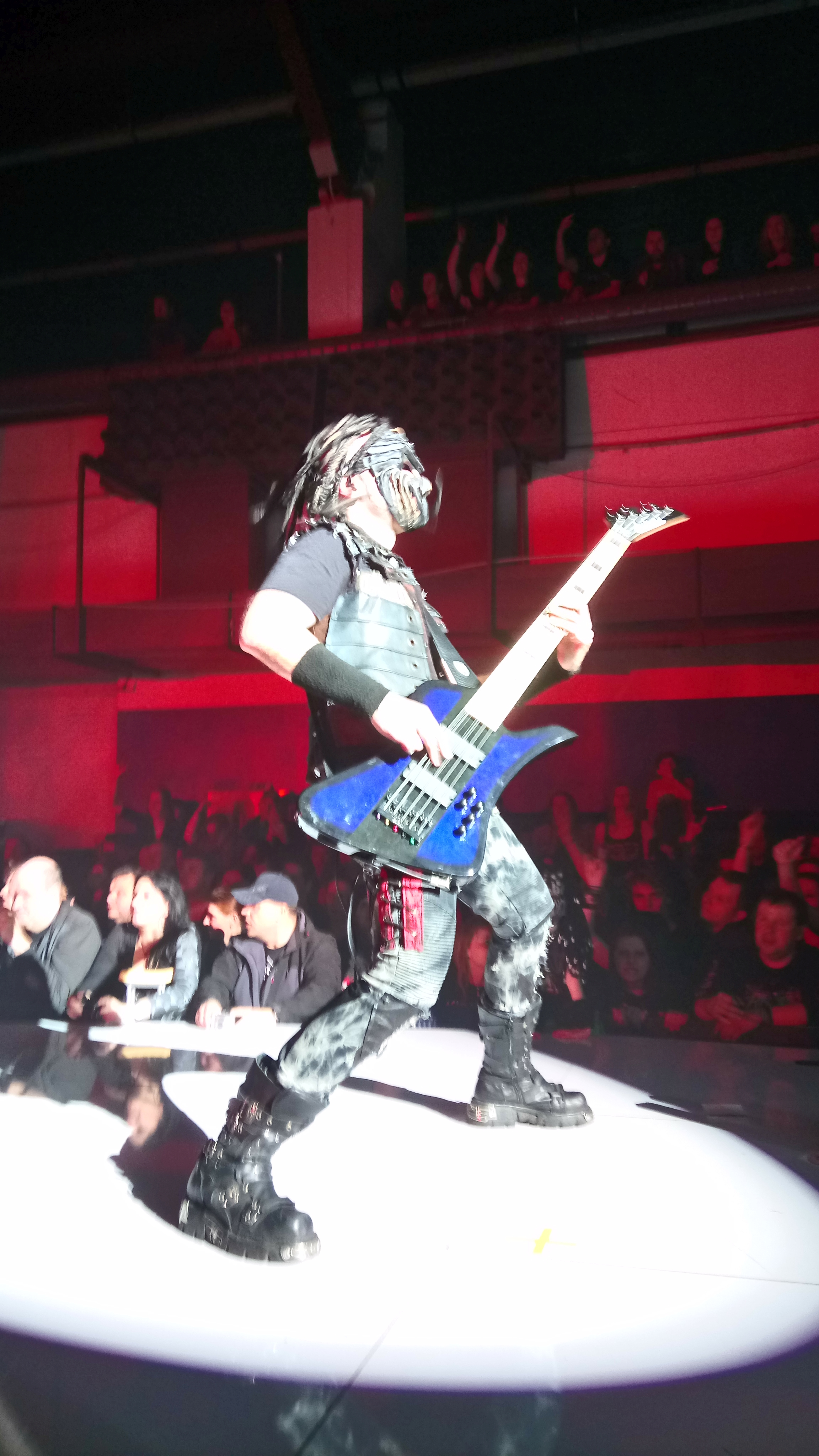 Artur Mikhaylov - Megakoncert Monstrum (Praha, Malá sportovní hala, 23.3.2018)